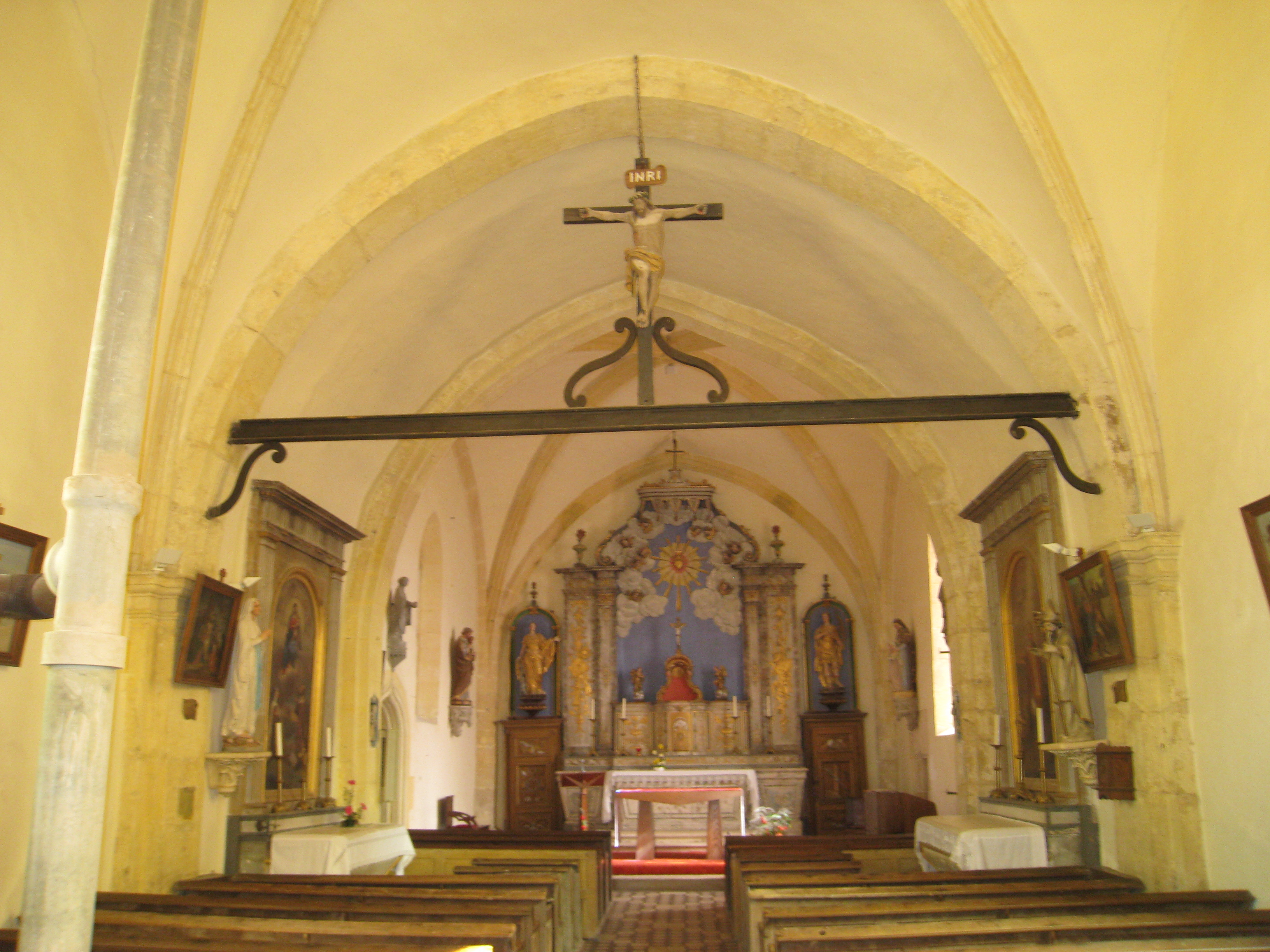 Intérieur de l'église de Villegusien, département de Haute-Marne, Champagne-Ardenne France